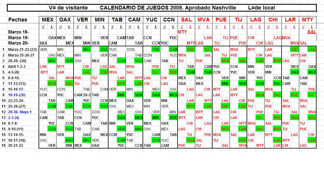 Rol de Juegos Primera Vuelta LMB 2008